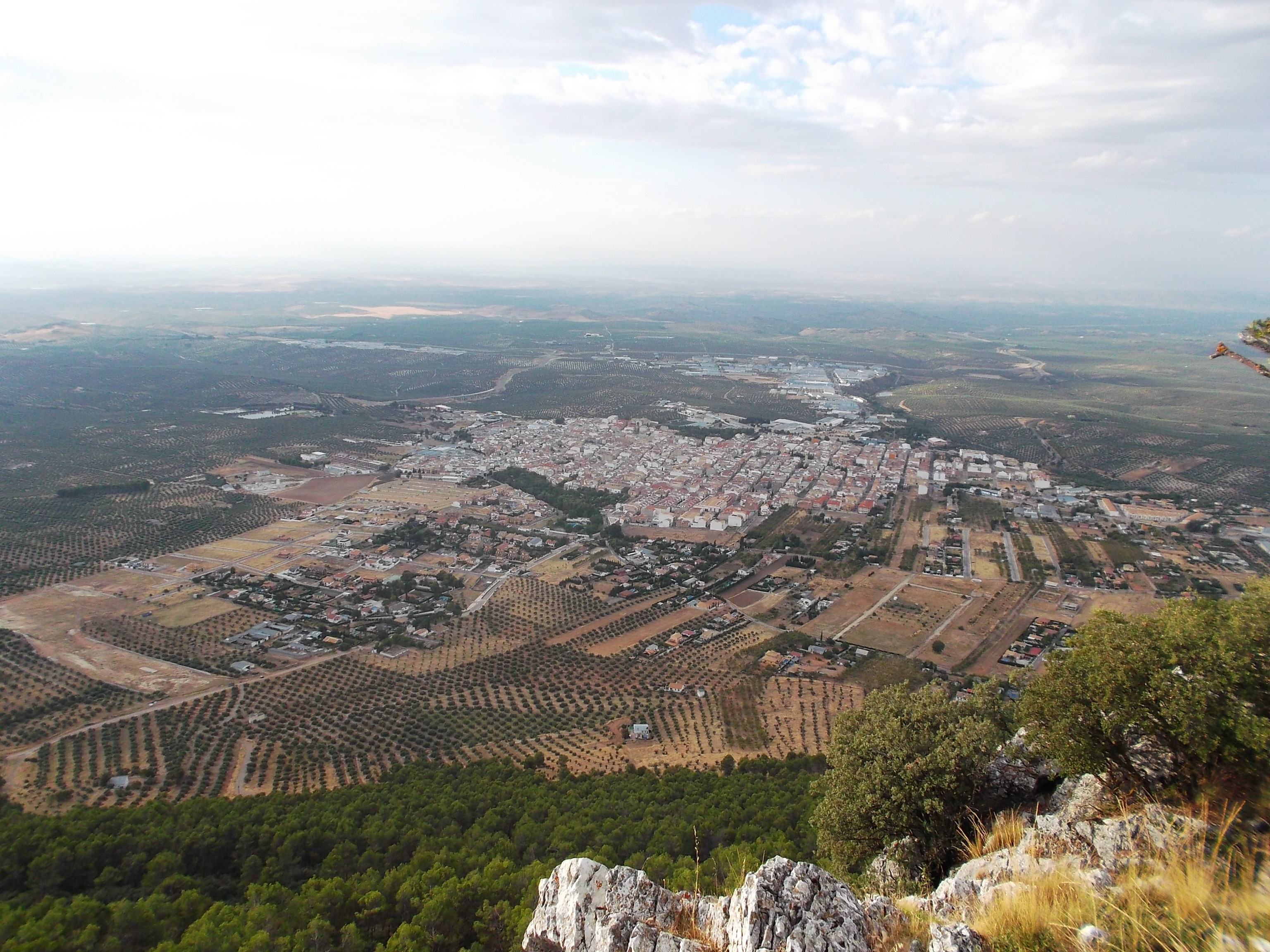 Vista general de Mancha Real, desde la Peña del Águila.